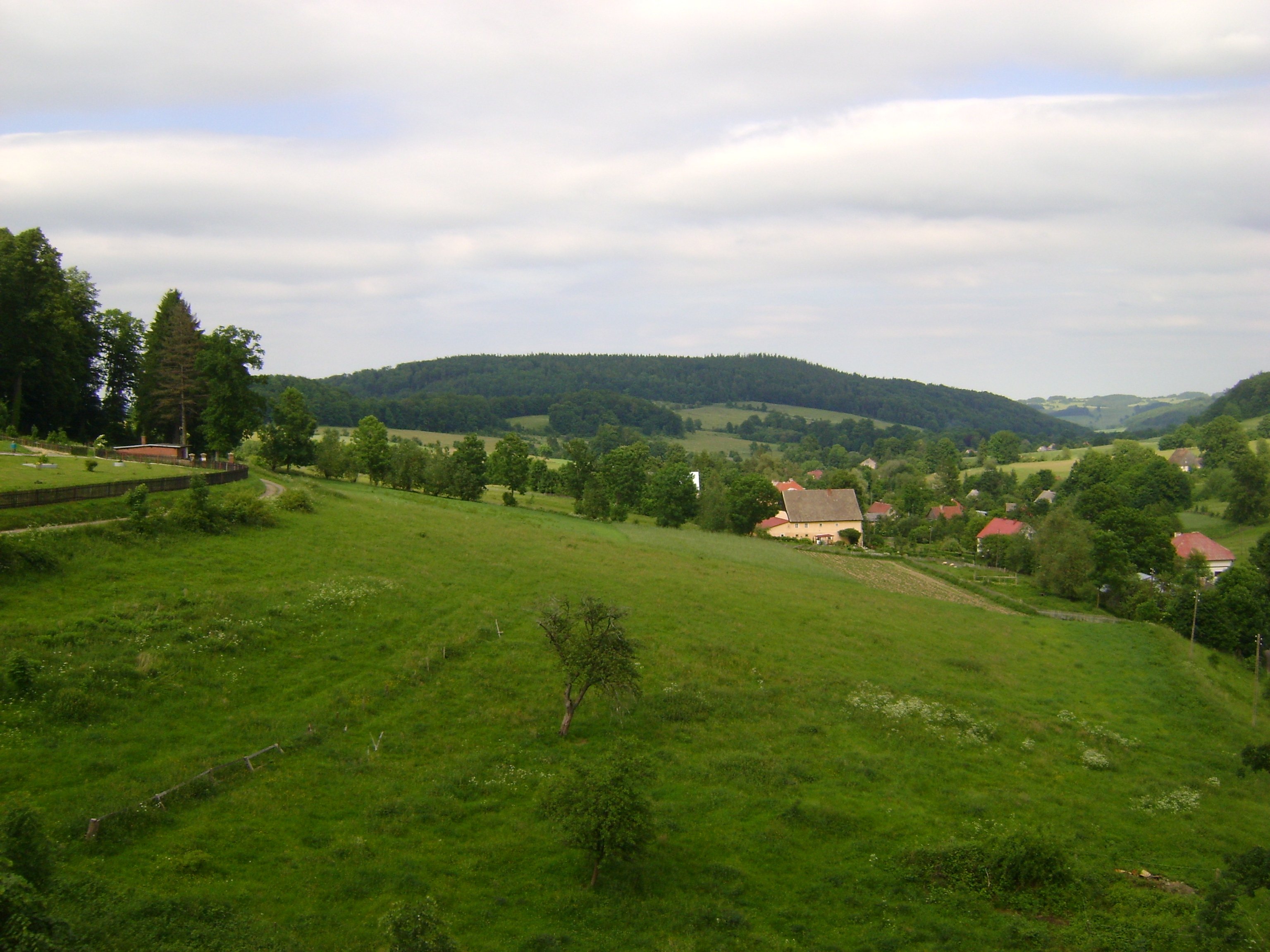 Radostka-wzniesienie w południowo-zachodniej Polsce w Górach Kaczawskich w Sudetach Zachodnich woj. dolnośląskie. Widok od strony południowo-zachodniej z miejscowości Podgórki.